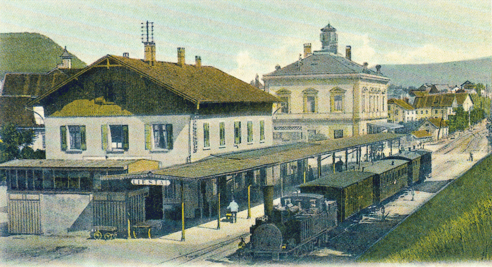 Der Bahnhof Liestal besass noch lange lediglich zwei durchlaufende Gleise. Zudem fehlt die separate Gleisgruppe für die 1880 eröffnete Schmalspurbahn nach Waldenburg, weil sie bis zur Abzweigung Altmarkt das Trasse der Schweizerischen Centralbahn (SCB) mit einem Vierschiengleis benutzte. Bei der Lokomotive vor dem Personenzug Richtung Basel handelt es sich um eine Engerth-Lokomotive Ec 2/5 der SCB.